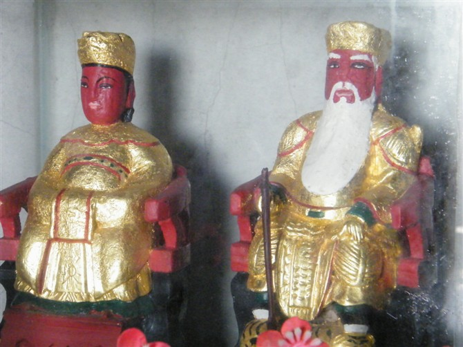 达濠东湖岭东山土地伯公、伯姆像